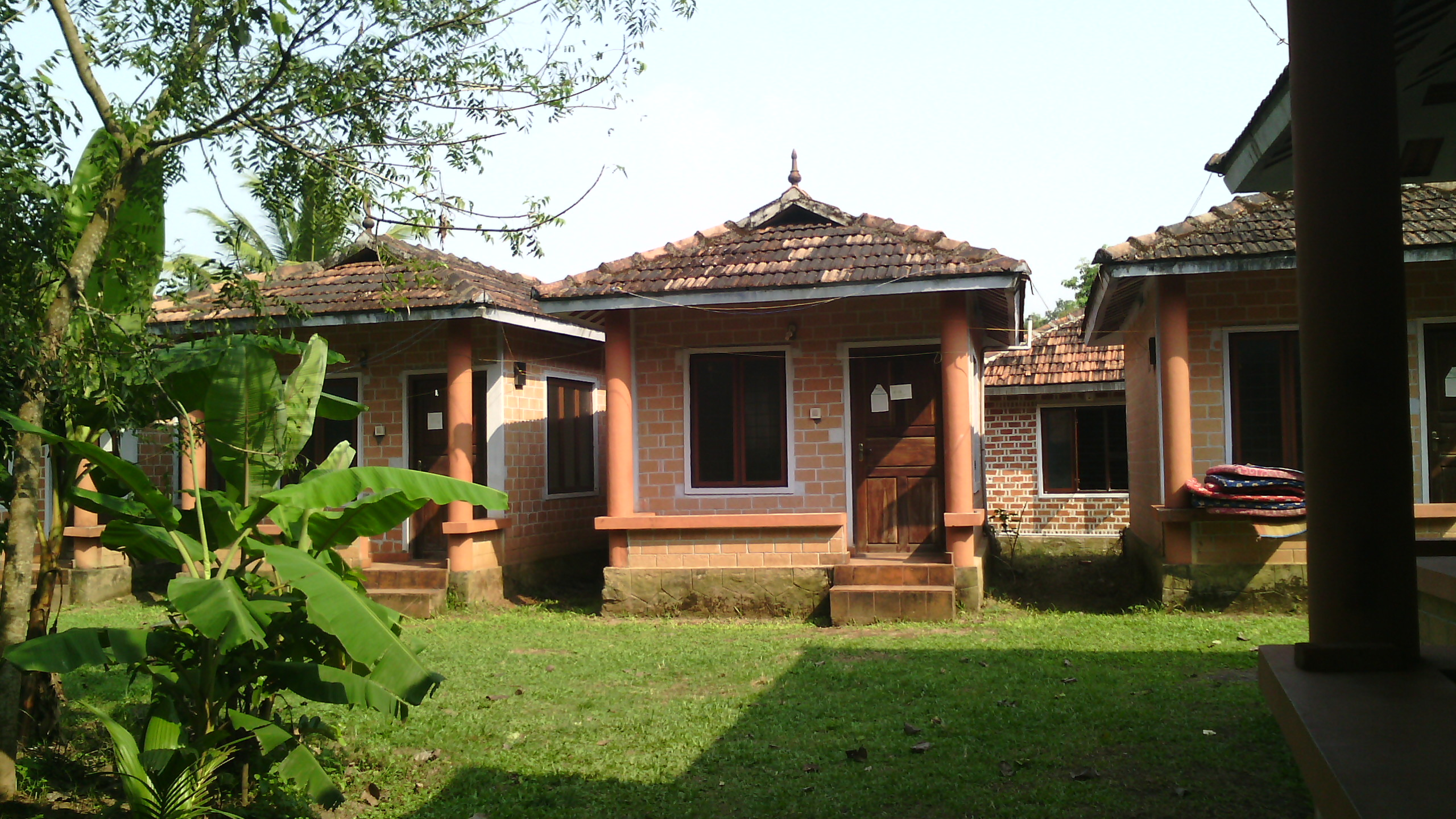 മൂഴിക്കുളം ശാല ജൈവ ഗ്രാമം ഒറ്റമുറി വീട്